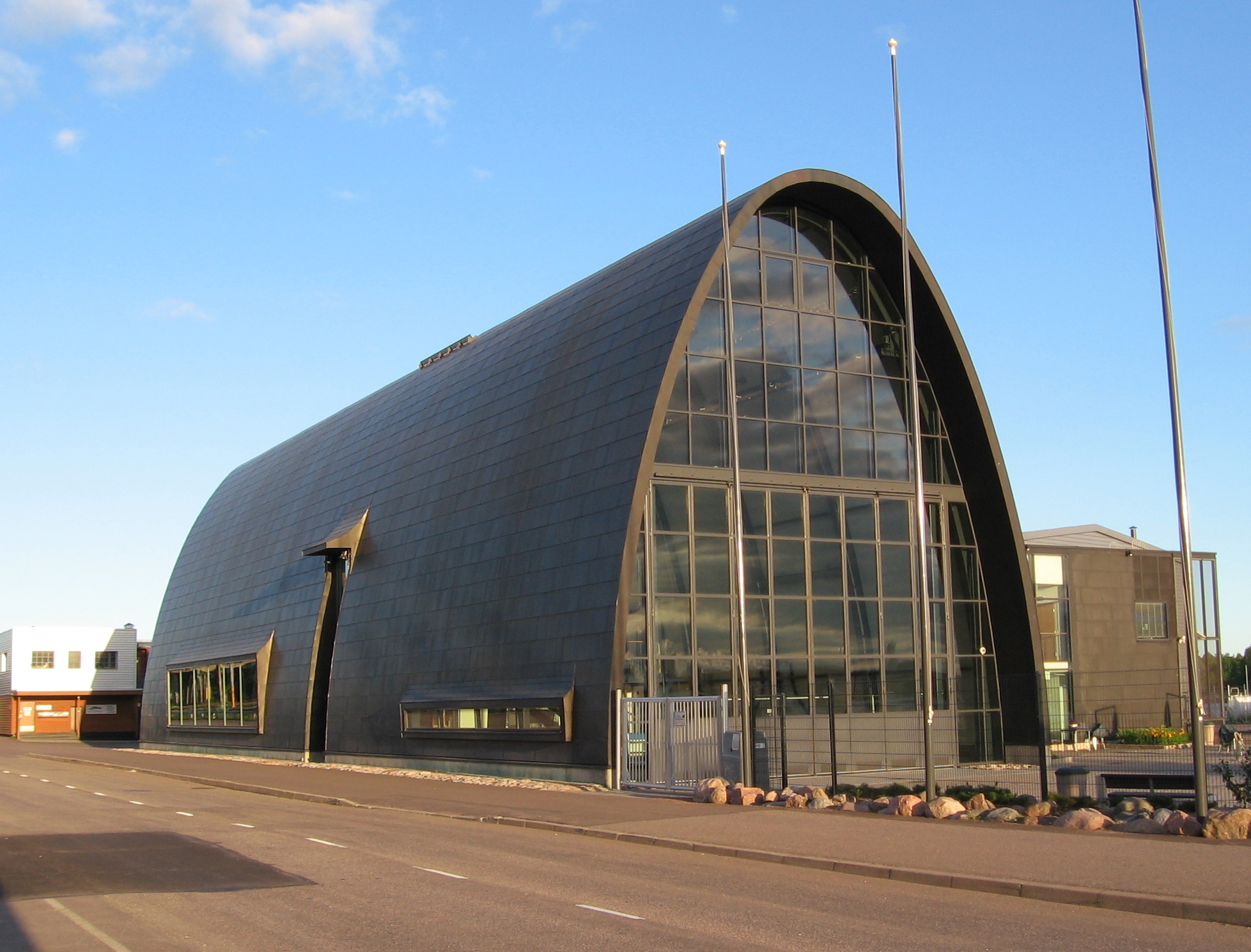 Suomen Puuvenekeskus Kotkassa Suomessa. Suunnitellut arkkitehtitoimisto Lahdelma & Mahlamäki.